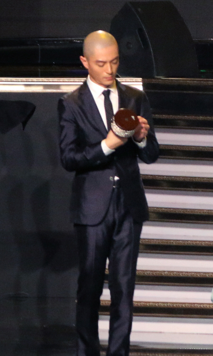 2016.9.9 芭莎明星慈善夜